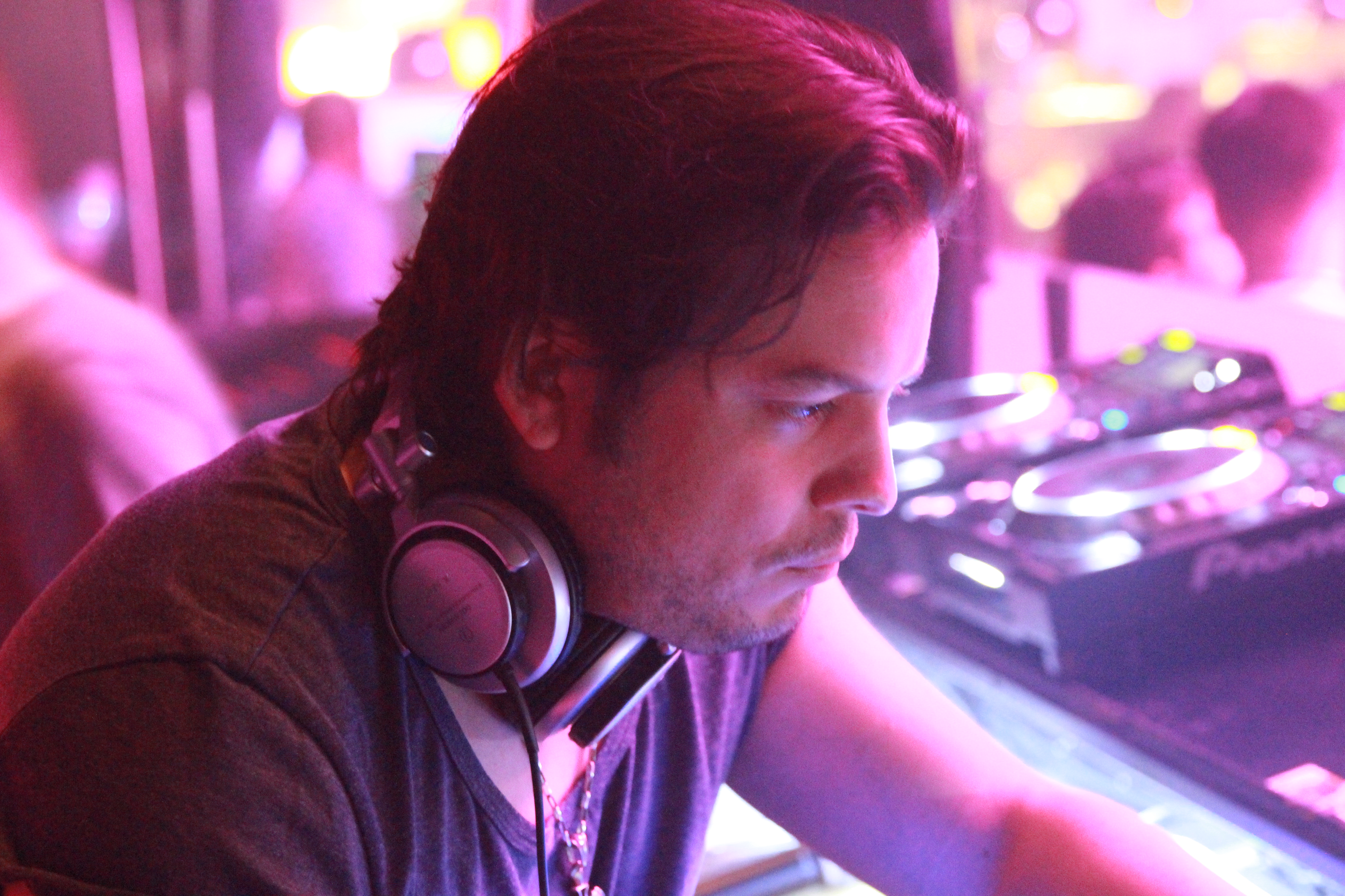 Tocadisco im Nachtwerk.